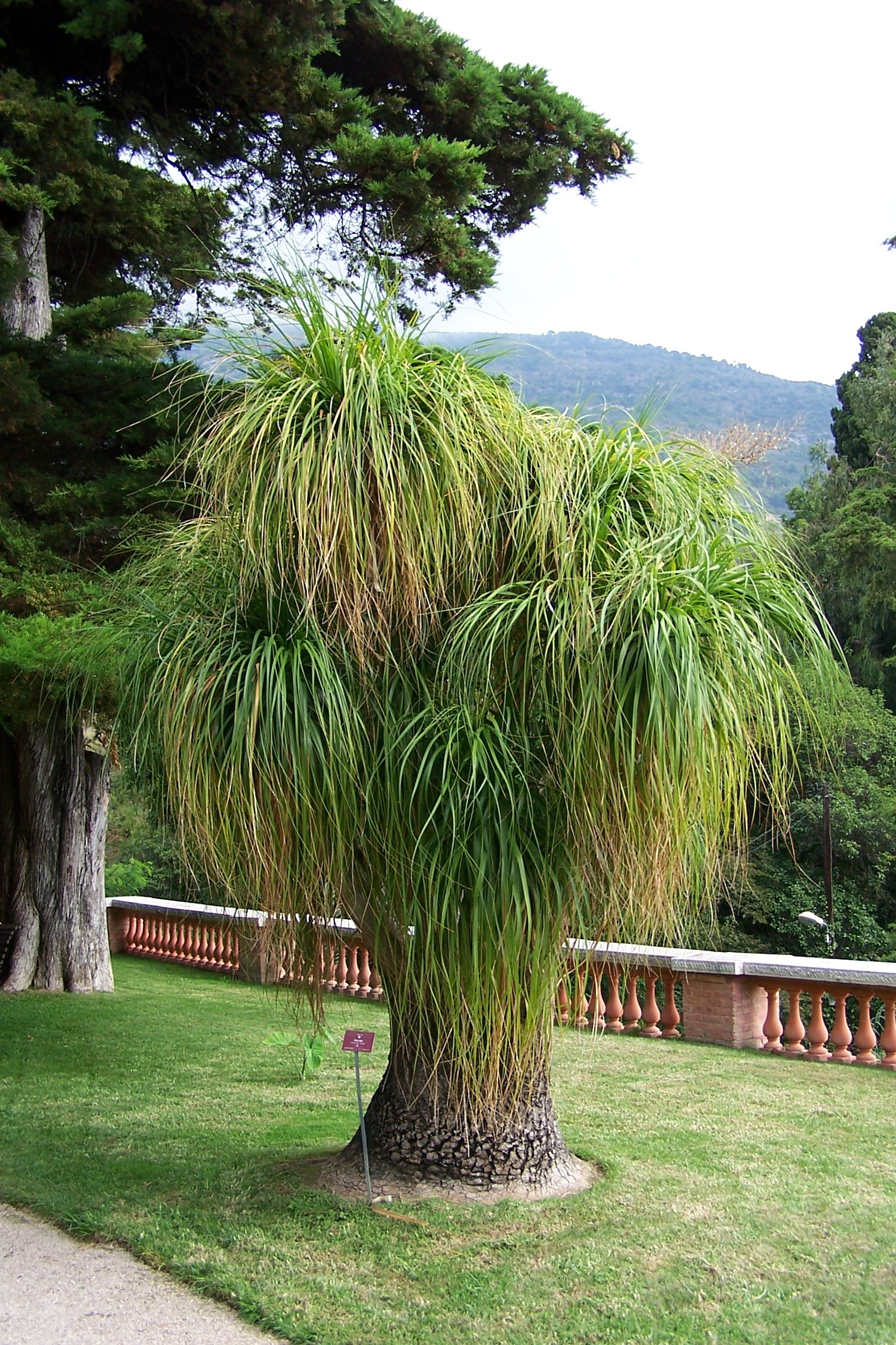 Nolina recurvata im Botnischen Garten Val Rameh in Menton